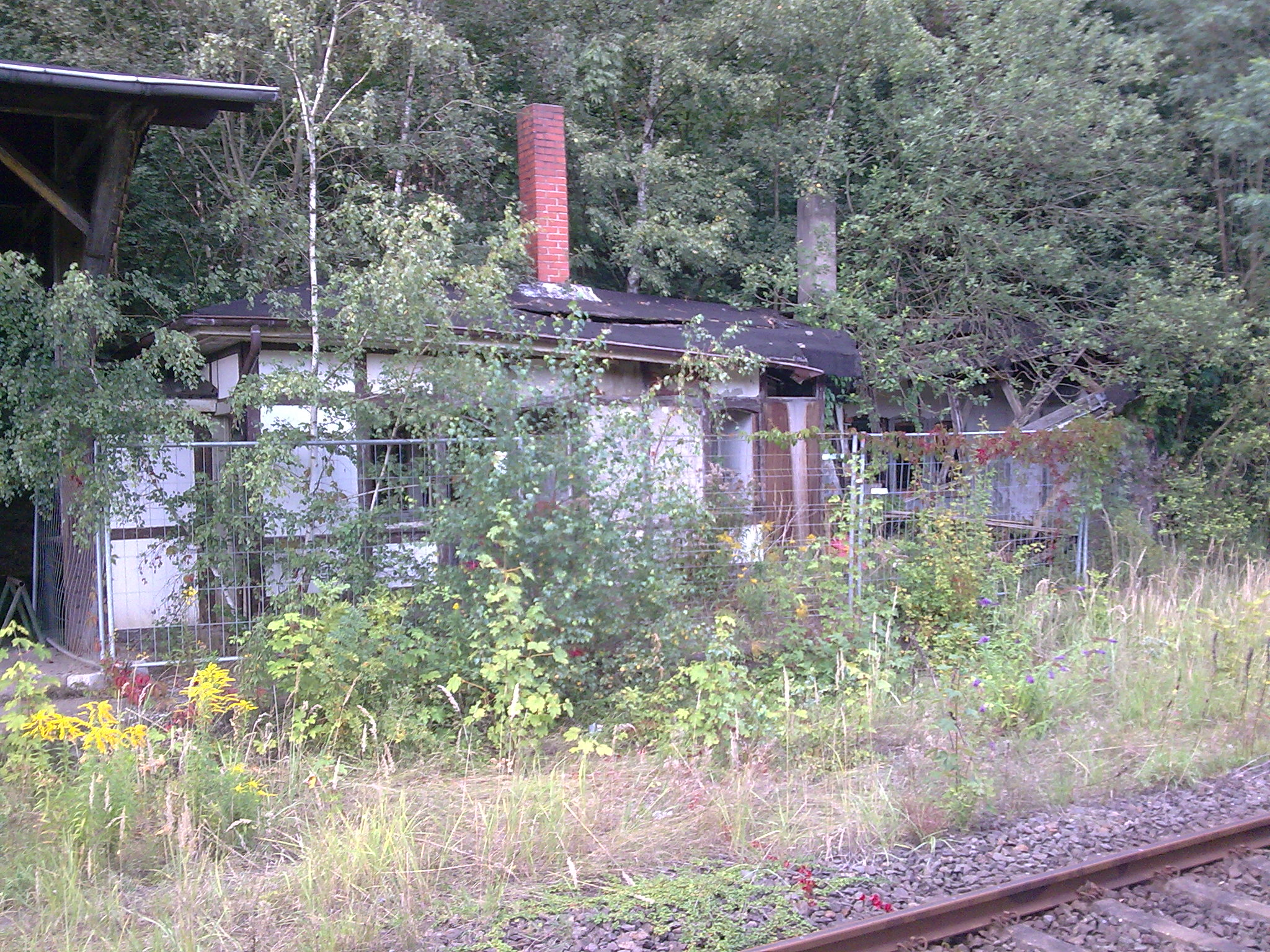 Eingestürztes Gebäude auf dem stillgelegten Bahnsteig 2, Bahnhof Dieringhausen